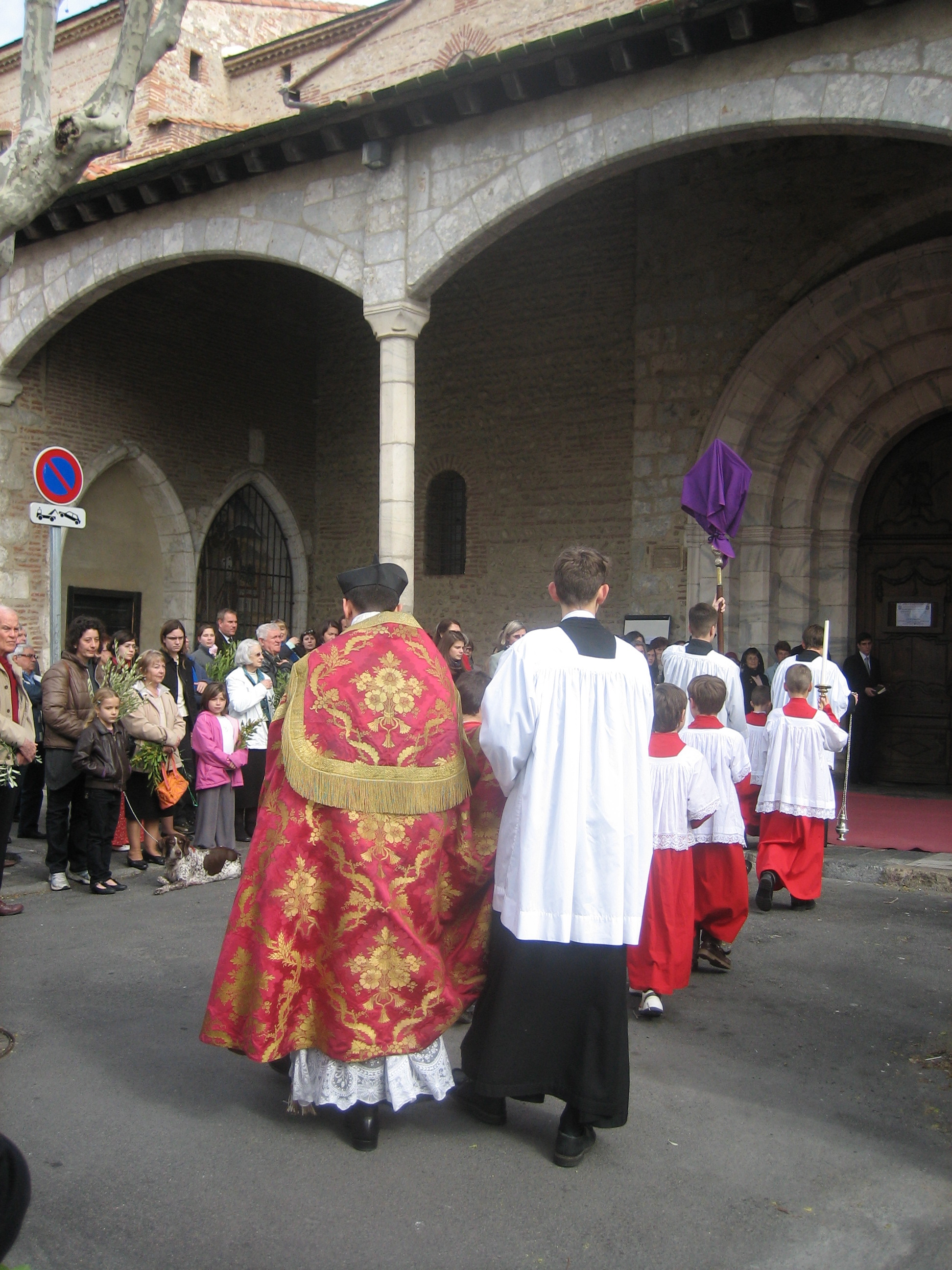 Benedicció dels rams del II Diumenge de Passió (de Rams) a l'apostolat de la FSSP a Perpinyà